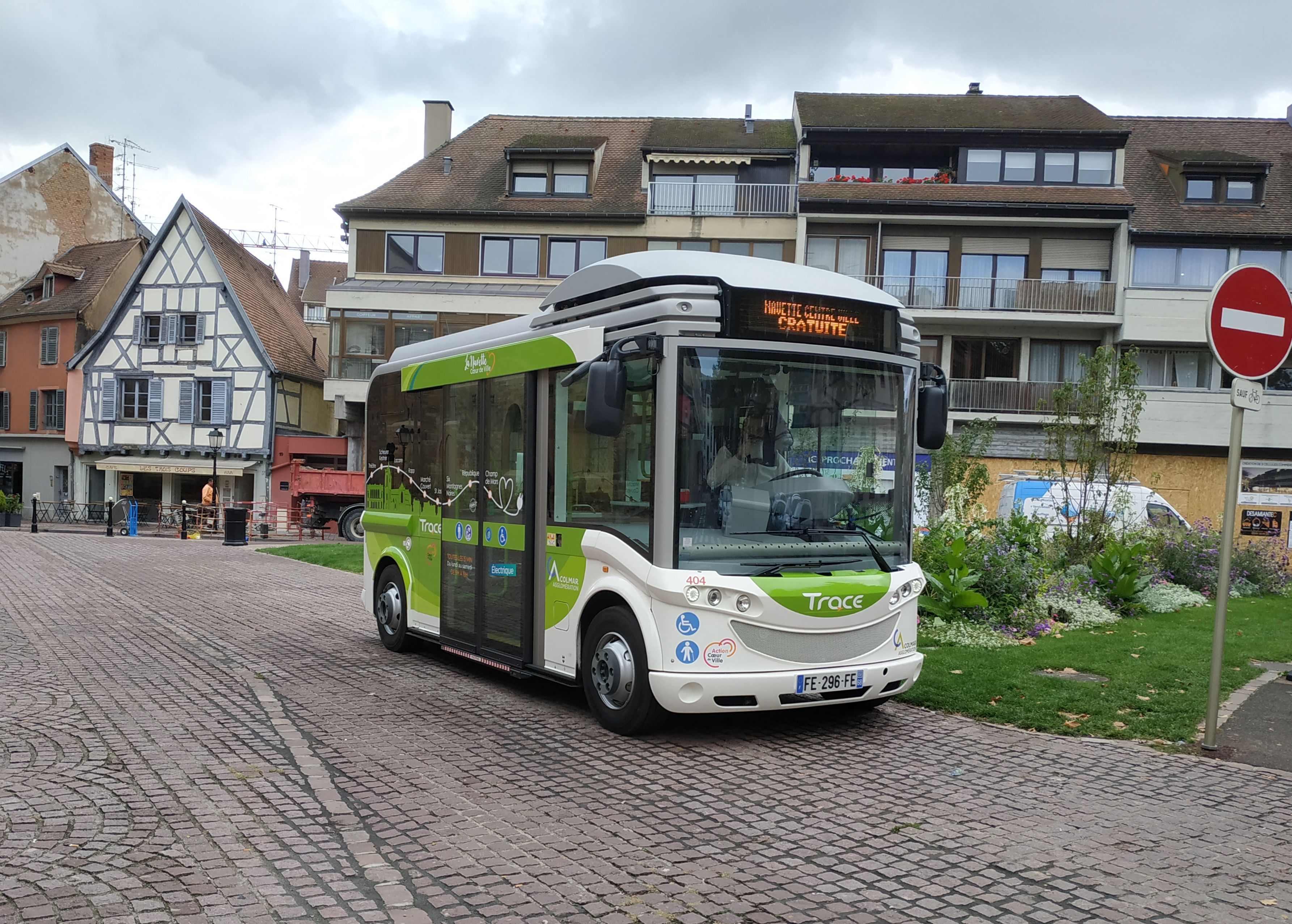 Un des Gruau Microbus de la navette du centre-ville de Colmar